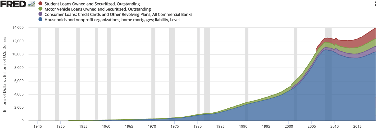 US consumer debt levels: home mortgages, student loans, motor vehicle loans, consumer loans